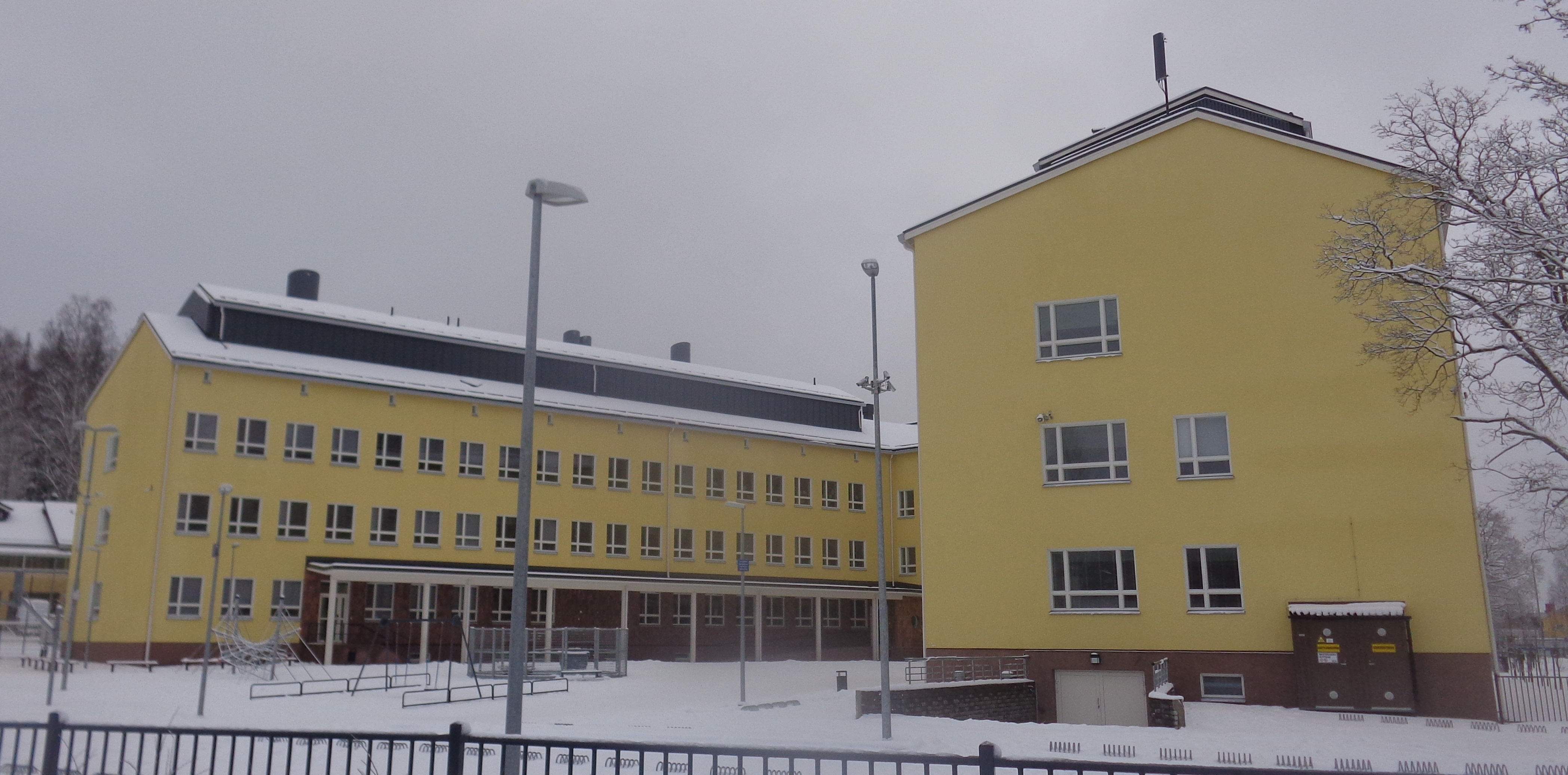 Riihimäellä sijaitseva Harjunrinteen koulu helmikuussa 2016.